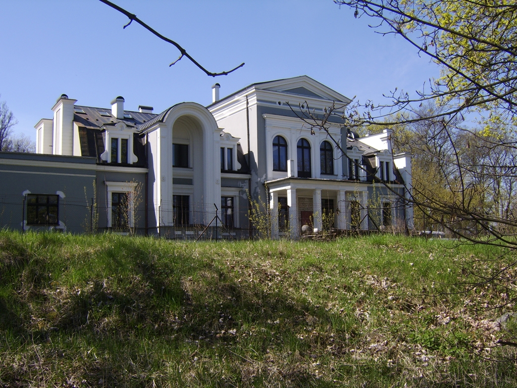 Zespół pałacowy: pałac, po 1860 Pluskowęsy, Gmina Chełmża